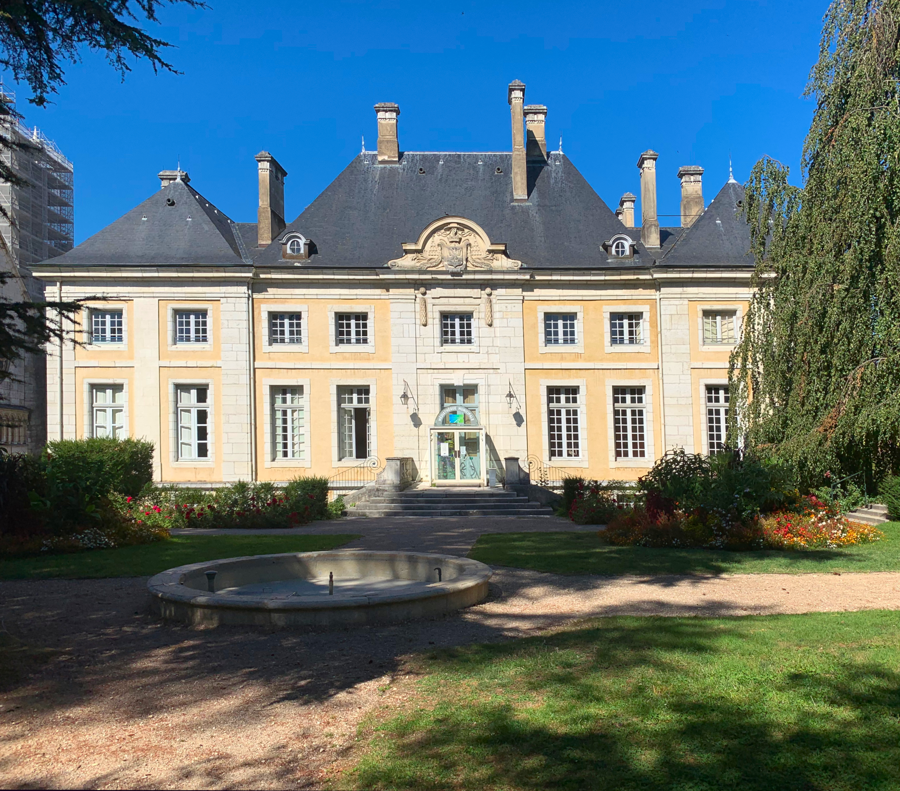 Palais épiscopal de Belley, côté médiathèque, depuis le jardin Jean-Pierre Camus.